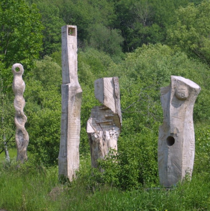 Skulpturen im Ellertal (Fränkische Straße der Skulpturen) auf Wikipediaformat gebracht --Immanuel Giel 12:01, 29. Mär 2005 (CEST) (für die GNU FDL)